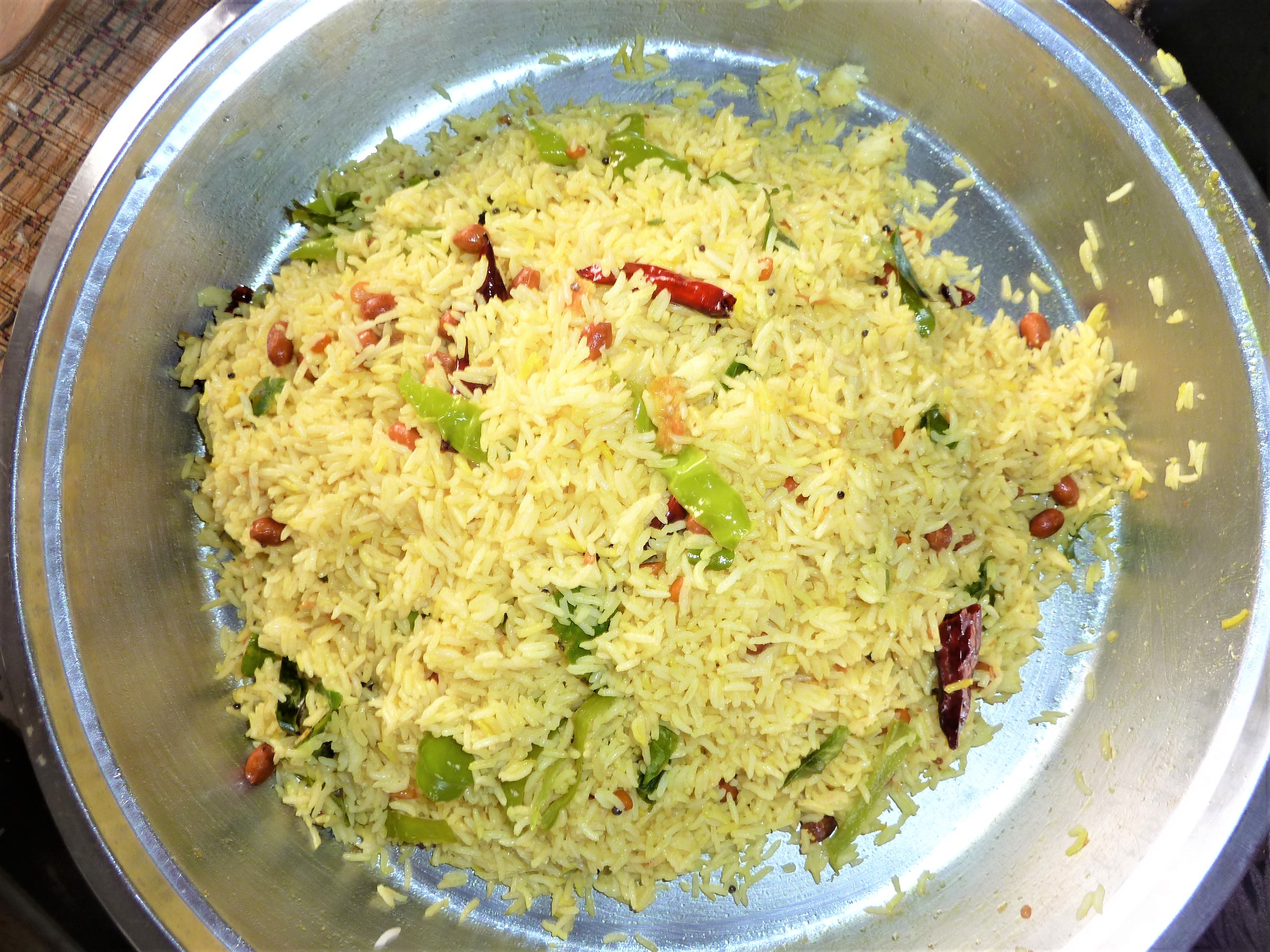 పులిహోర (చింతపండు)